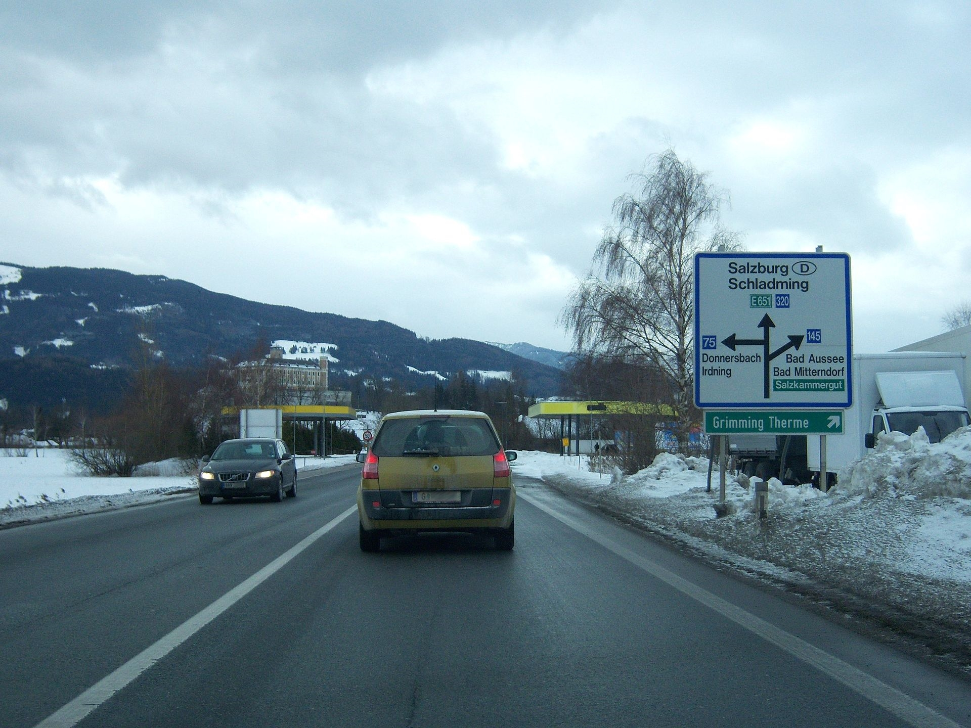 Ennstal Straße B320 Richtung Altenmarkt bei Trautenfels: Kreuzung mit Salzkammergut Straße B145 und Glattjoch Straße B75